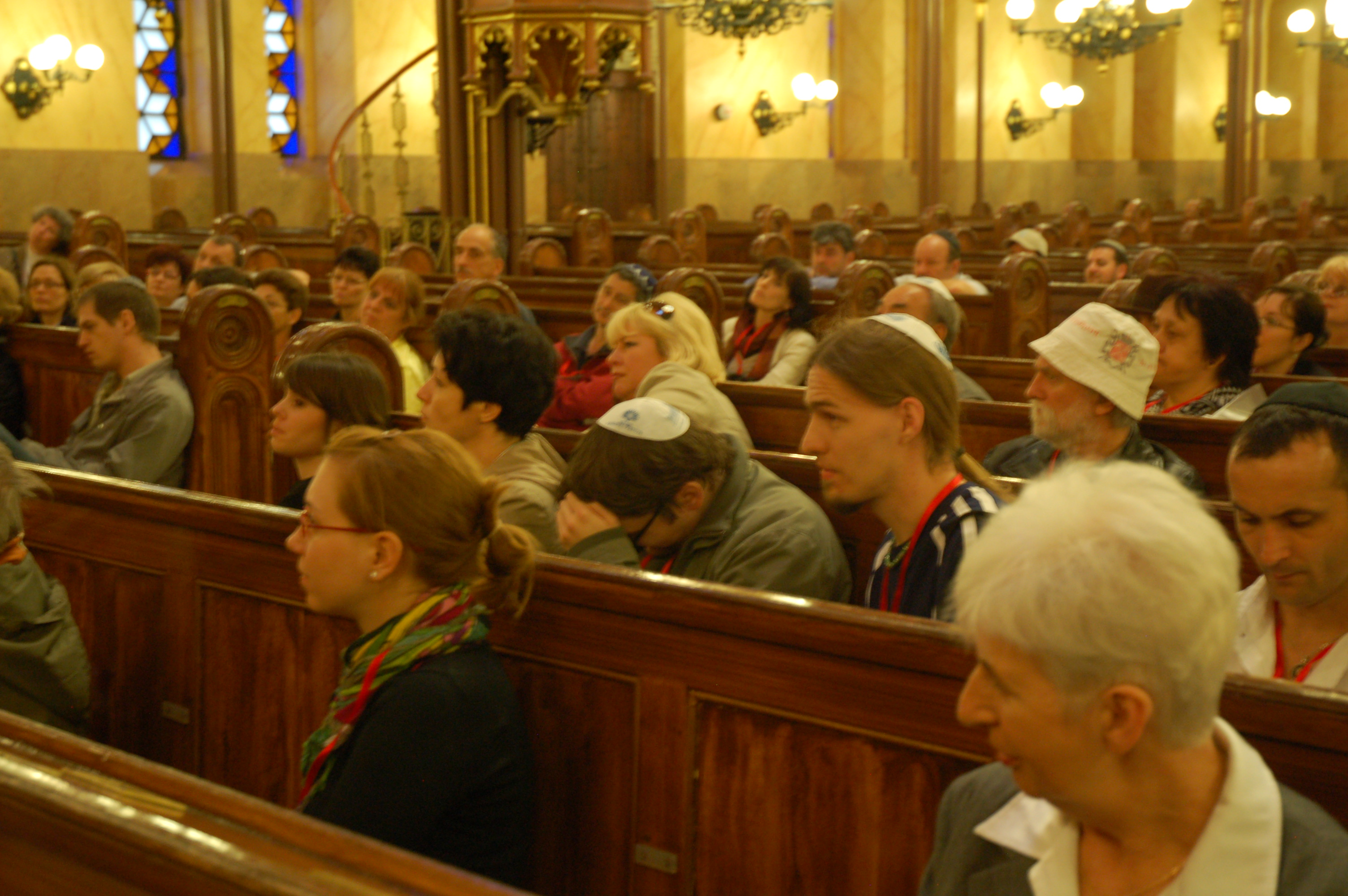 Wikipédisták látogatáson